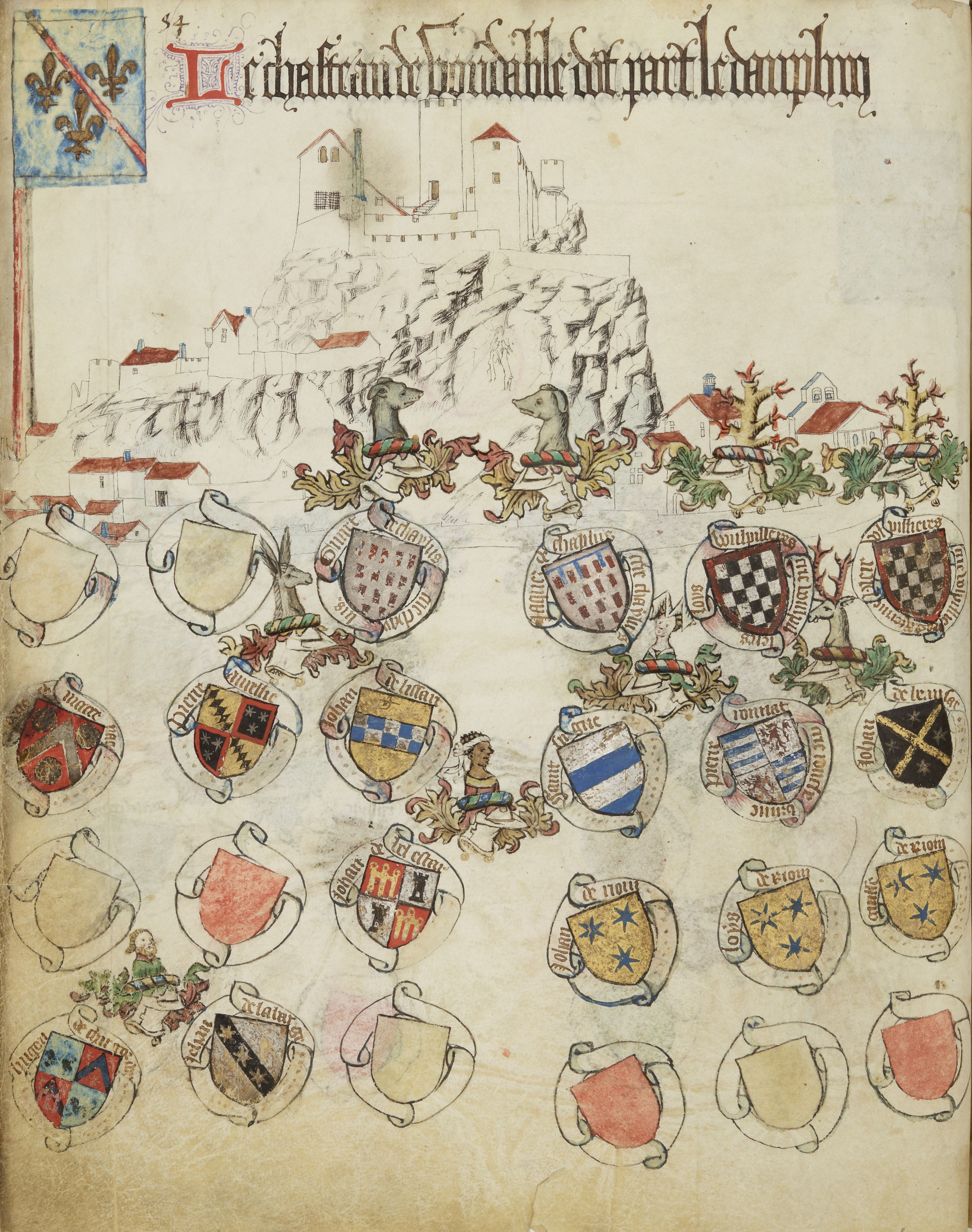 Extrait de l'Armorial de Guillaume Revel concernant Vodable. On y voit le château et le village tel qu'il était au milieu du XVe siècle.